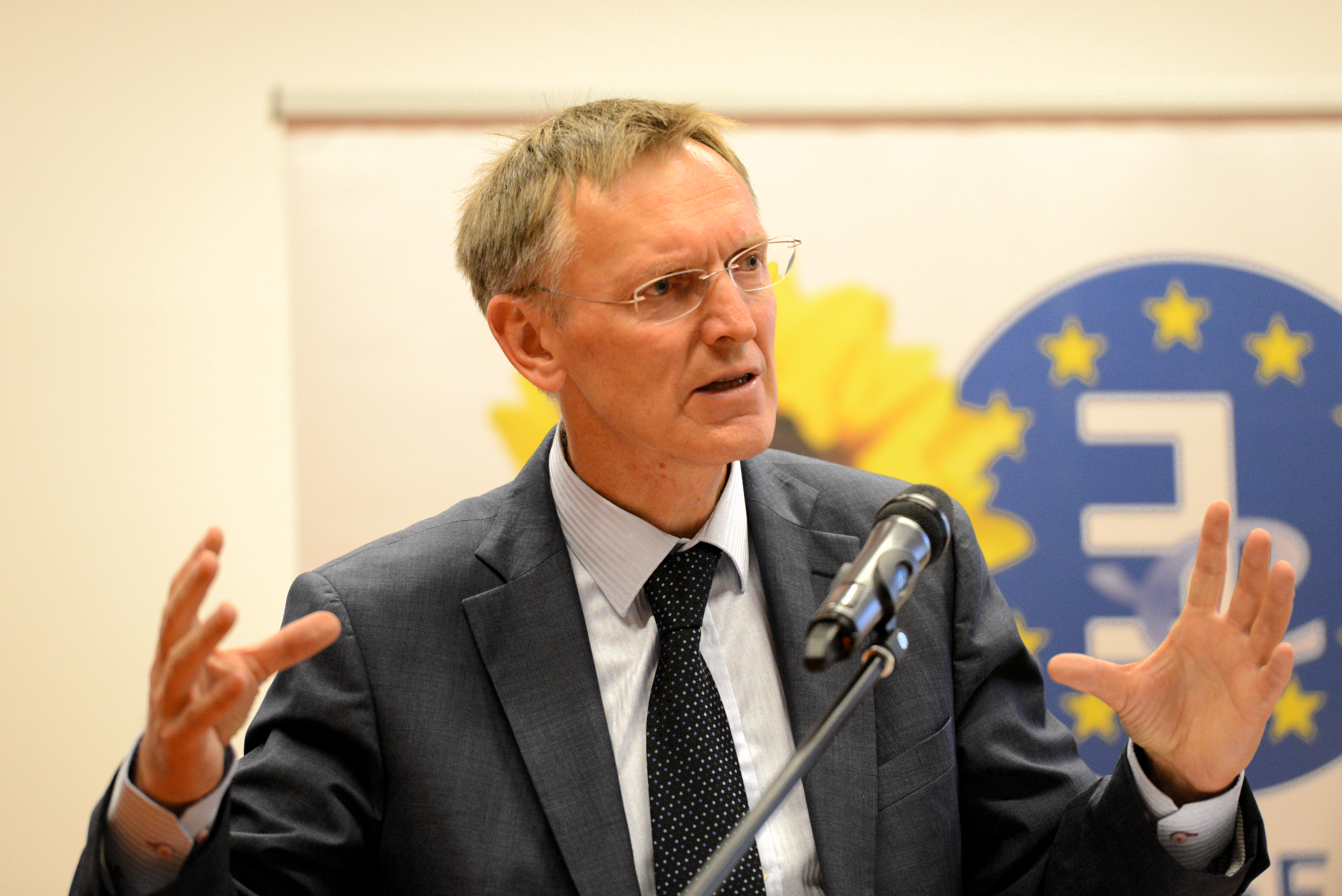 De Janez Potočnik, Ëmwelt-Kommissär vun der Europäescher Kommissioun, bei senger Interventioun an der Conférence-débat: «Économie circulaire et nouvelles formes de consommation. Stratégies européennes et perspectives luxembourgeoises», den 20. Oktober 2014 am CRP Henri-Tudor um Kierchbierg.